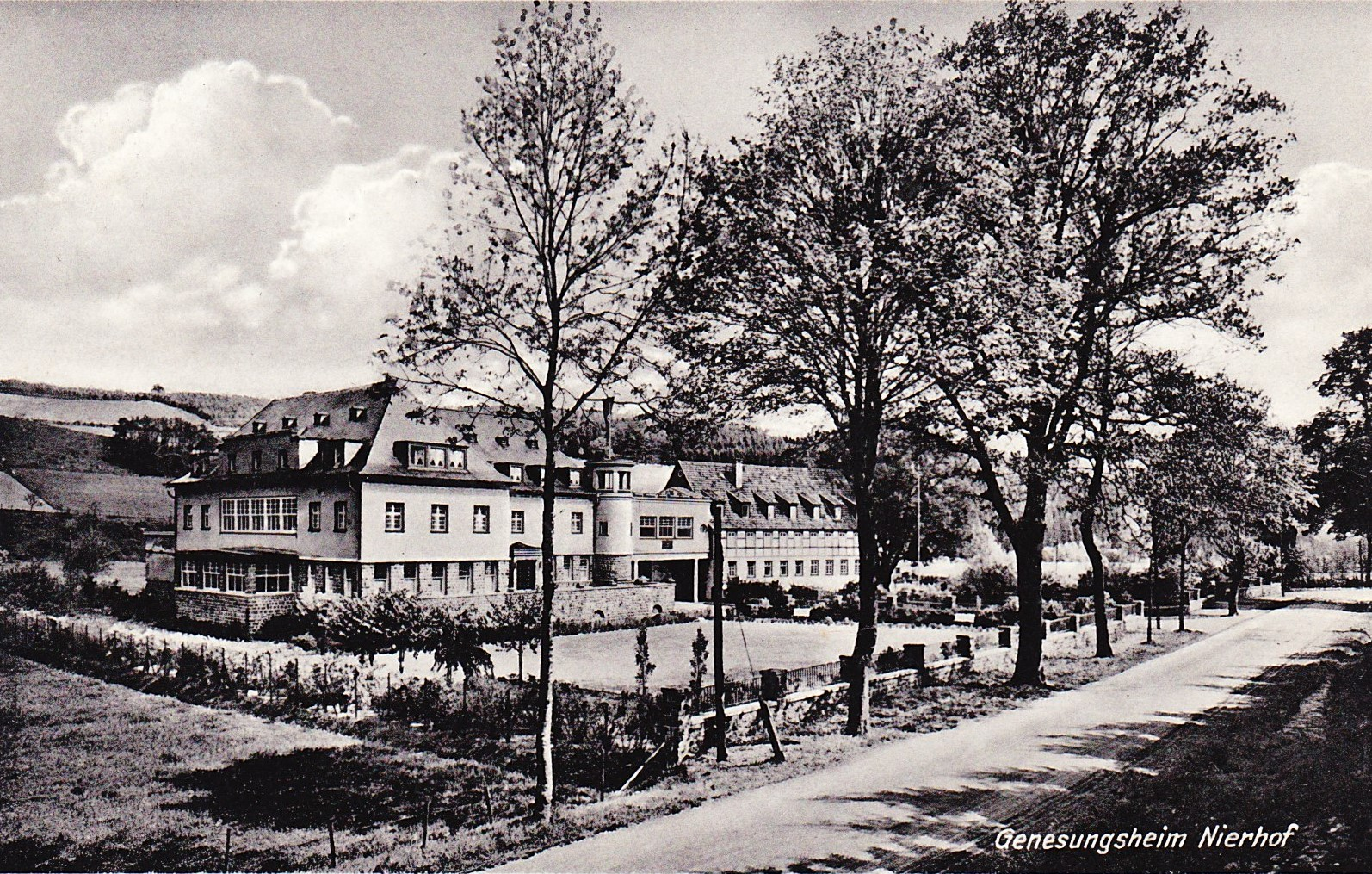 Genesungsheim Gut Nierhof der Reichsbahn - Betriebskrankenkasse Köln. Postkarte, gelaufen 1934. Das 1995 abgerissene Gut lag an der Ihne zwischen Albringhausen und Listerscheid.